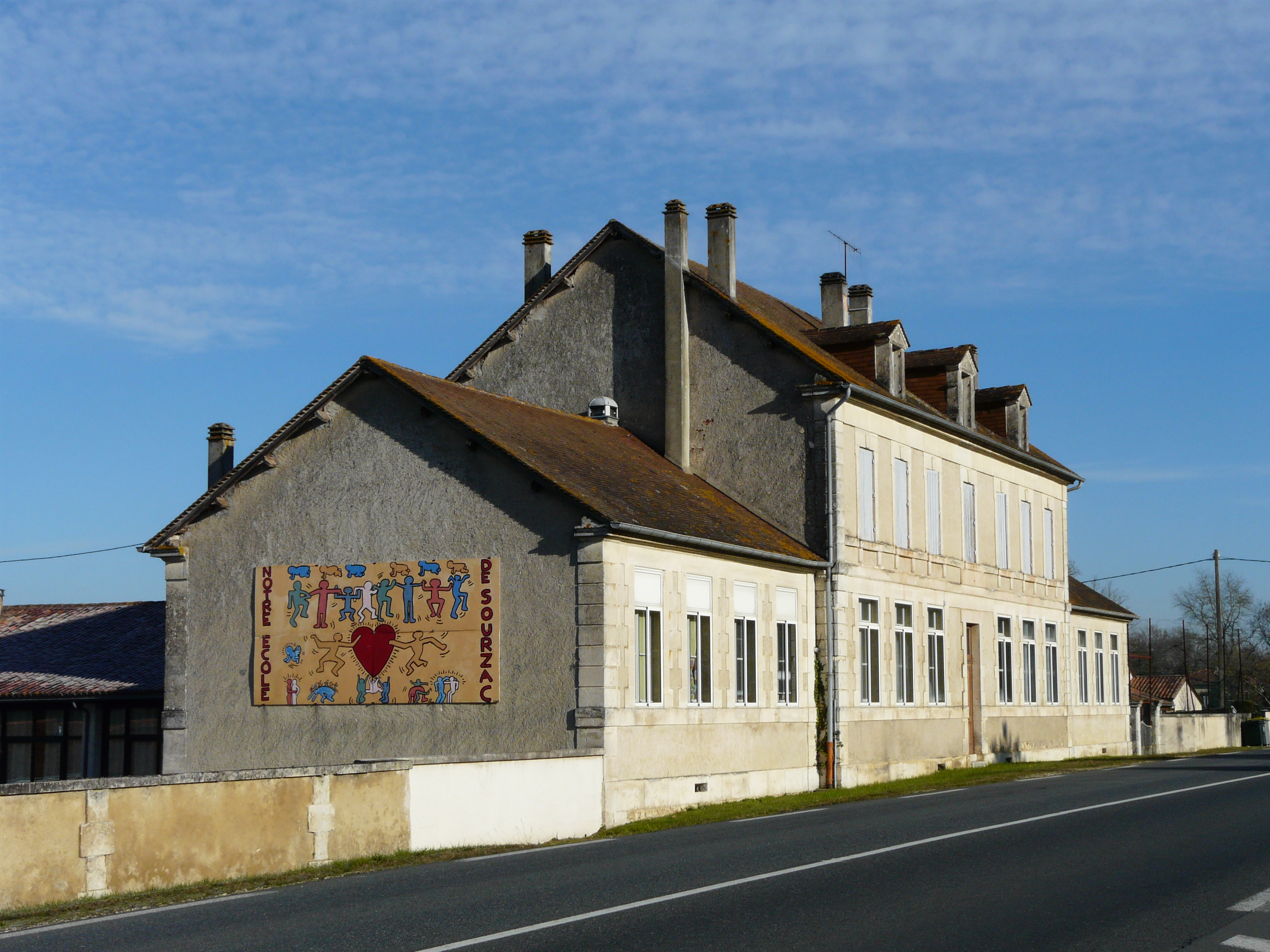 L'école de Sourzac au lieu-dit Baronie, Dordogne, France.